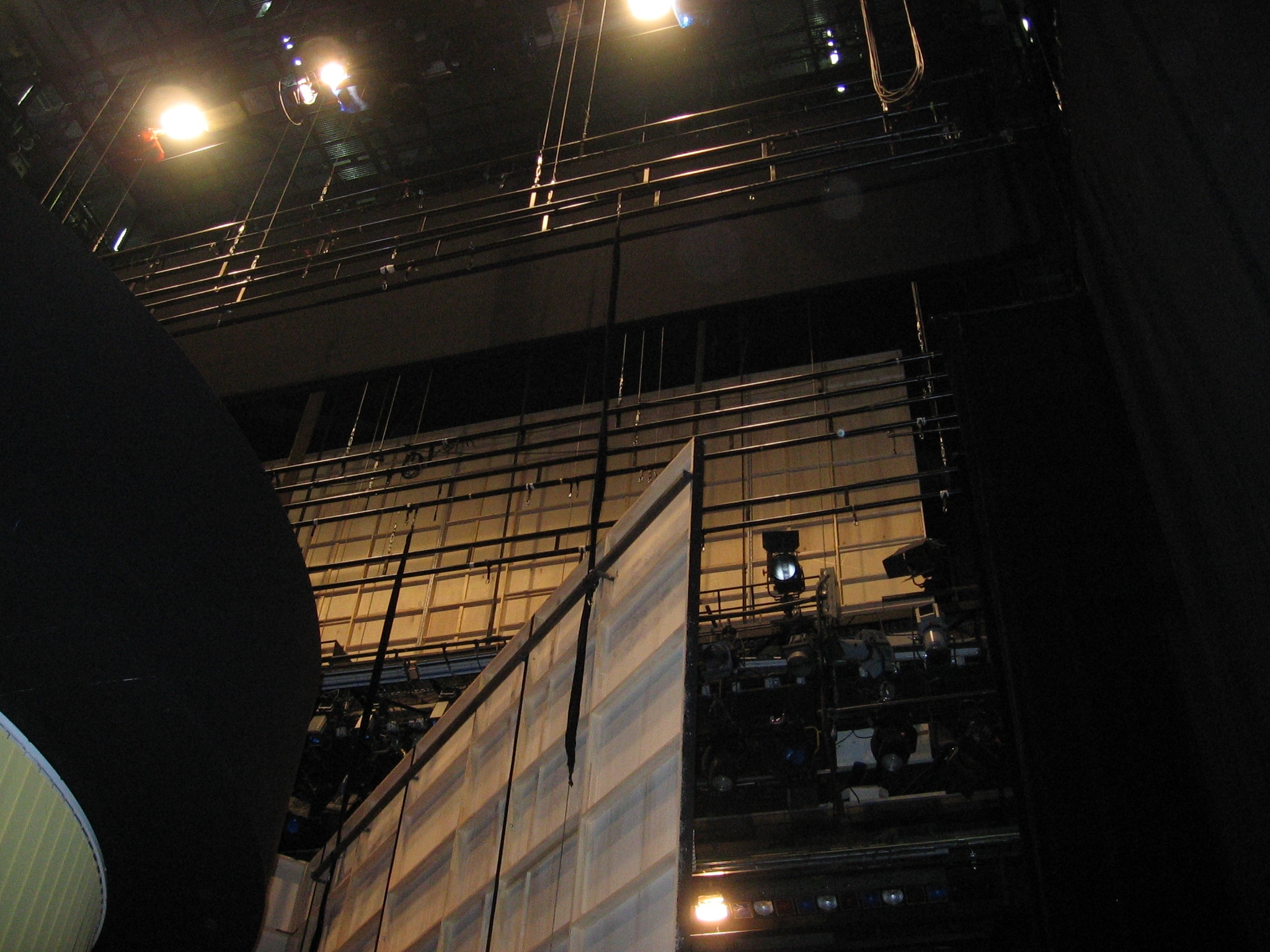 Bühnenhaus des kleinen Hause im Staatstheater Darmstadt